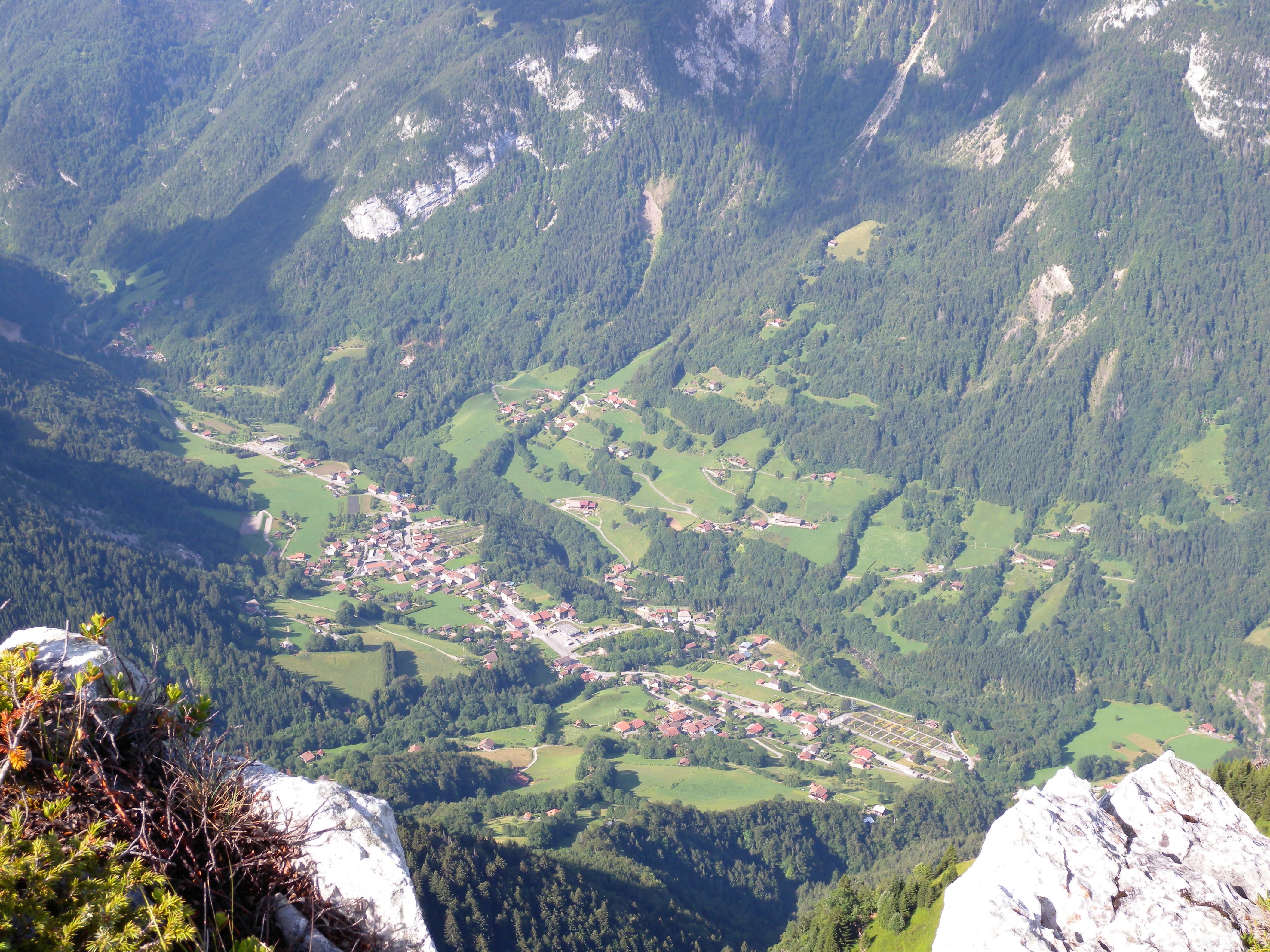 Le Petit-Bornand-les-Glières, dite "Petit Bornand"